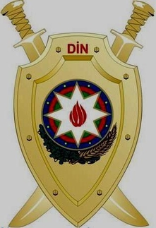 לוגו he:משרד הפנים של אזרבייג'ן